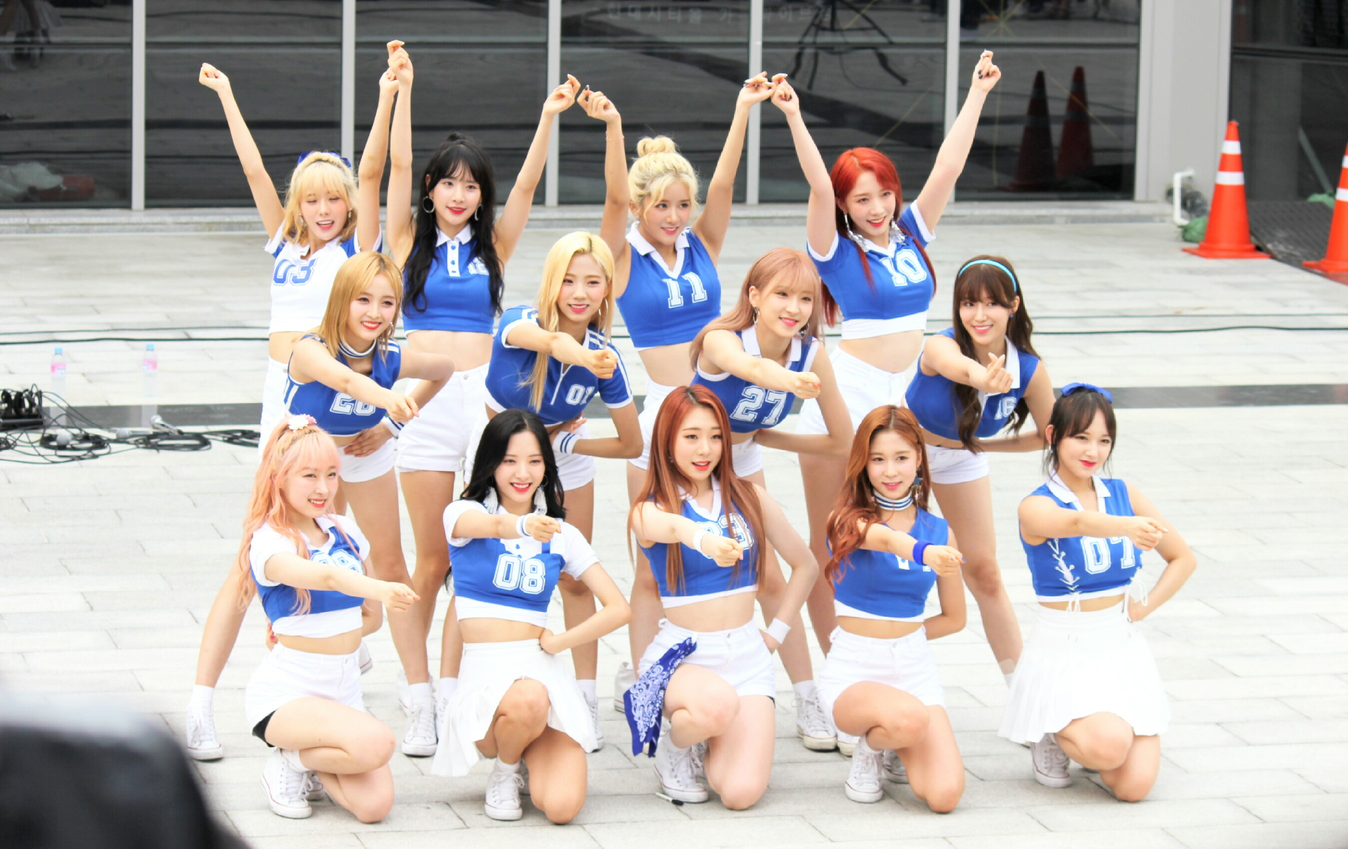 170716 수서역 게릴라